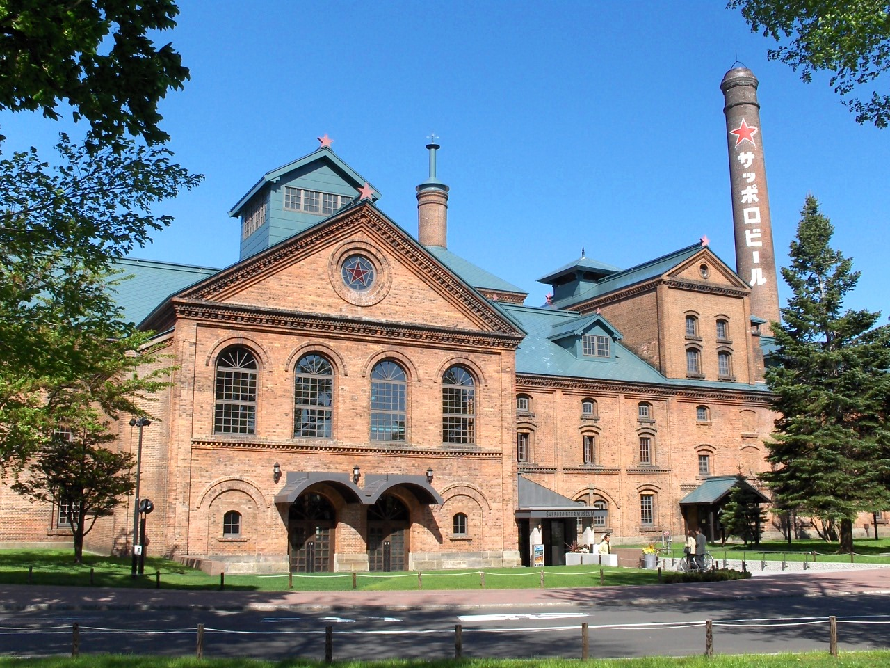 北海道札幌市、サッポロビール博物館外観。2007年5月、投稿者K. Takeda撮影。 Category:札幌市の画像